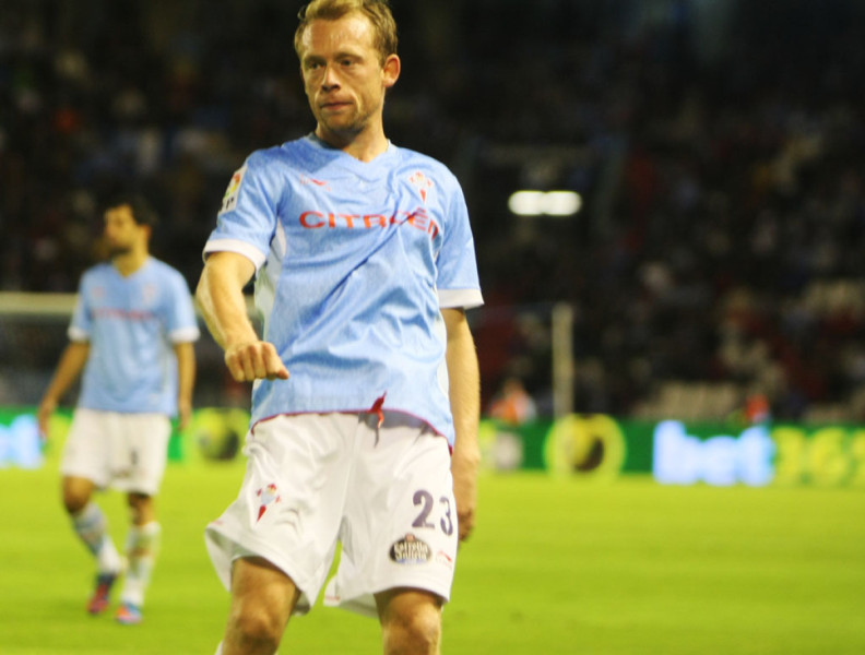 Michael Krohn-Dehli no partido Celta-Dépor do 27 de outubro do 2012.